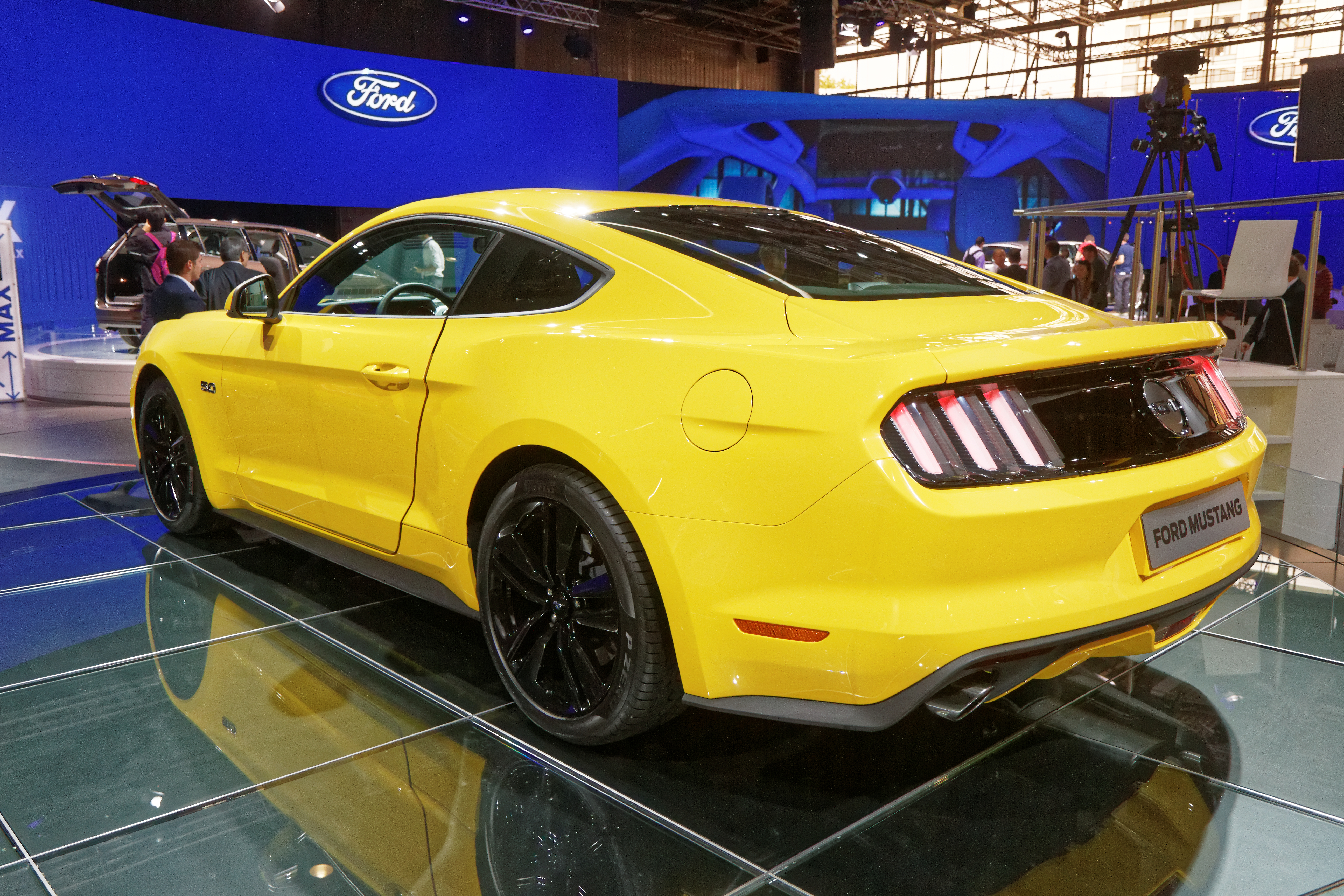 Une Ford Mustang présentée lors du mondial de l'automobile de Paris 2014.